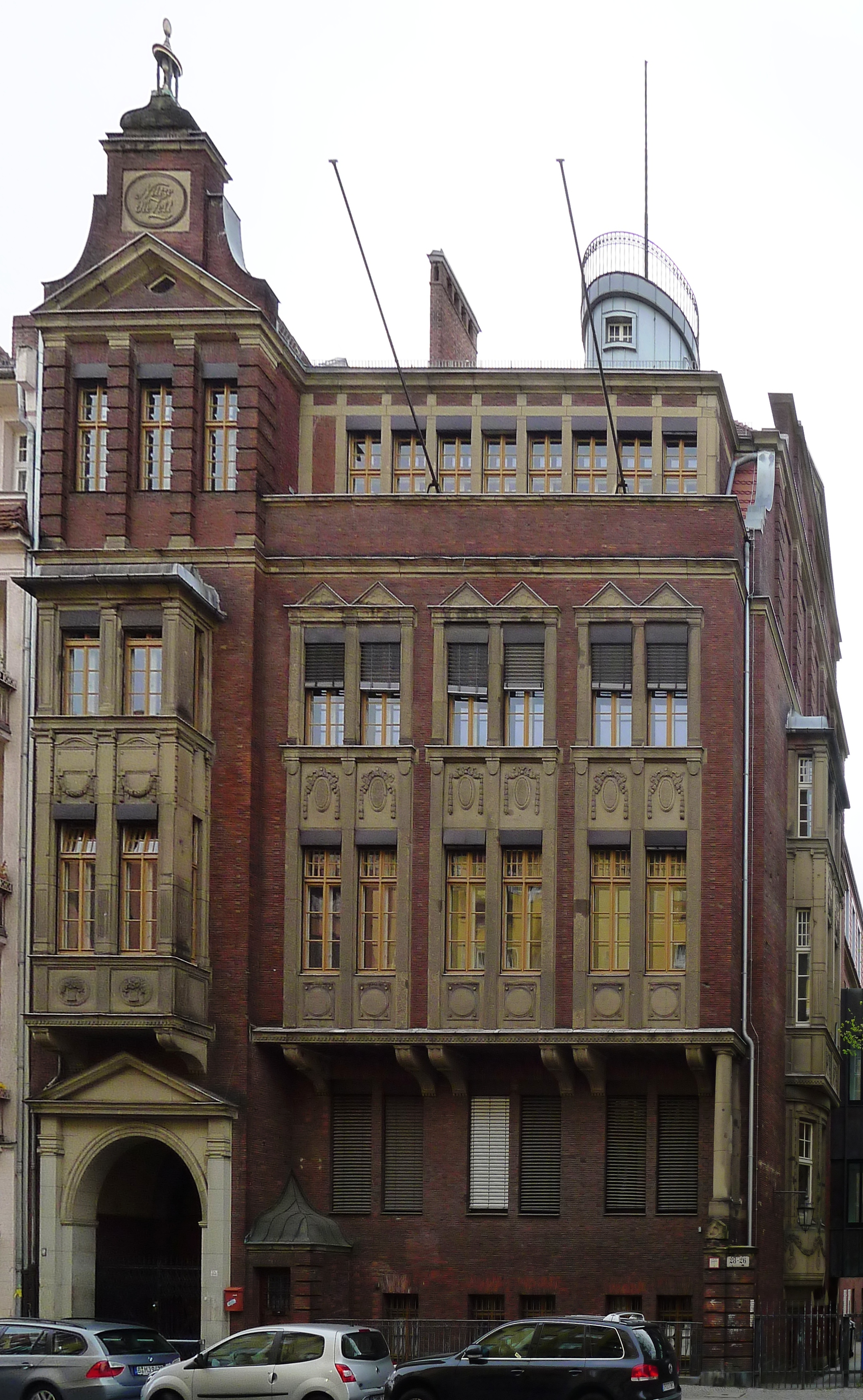 ehemalige Städtische Höhere Mädchenschule III der Stadt Charlottenburg (heute Oberstufenzentrum für Recht) in Berlin-Charlottenburg, Danckelmannstraße 28; erbaut 1906–1908